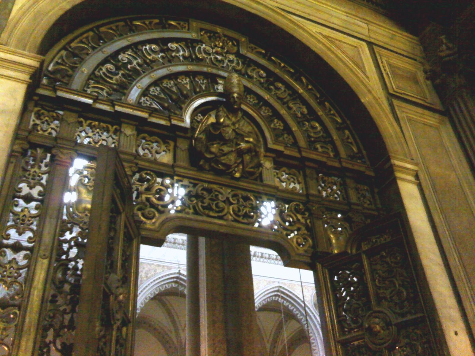 Cancello di Cosimo Fanzago - Cappella del tesoro di San Gennaro (duomo di Napoli)